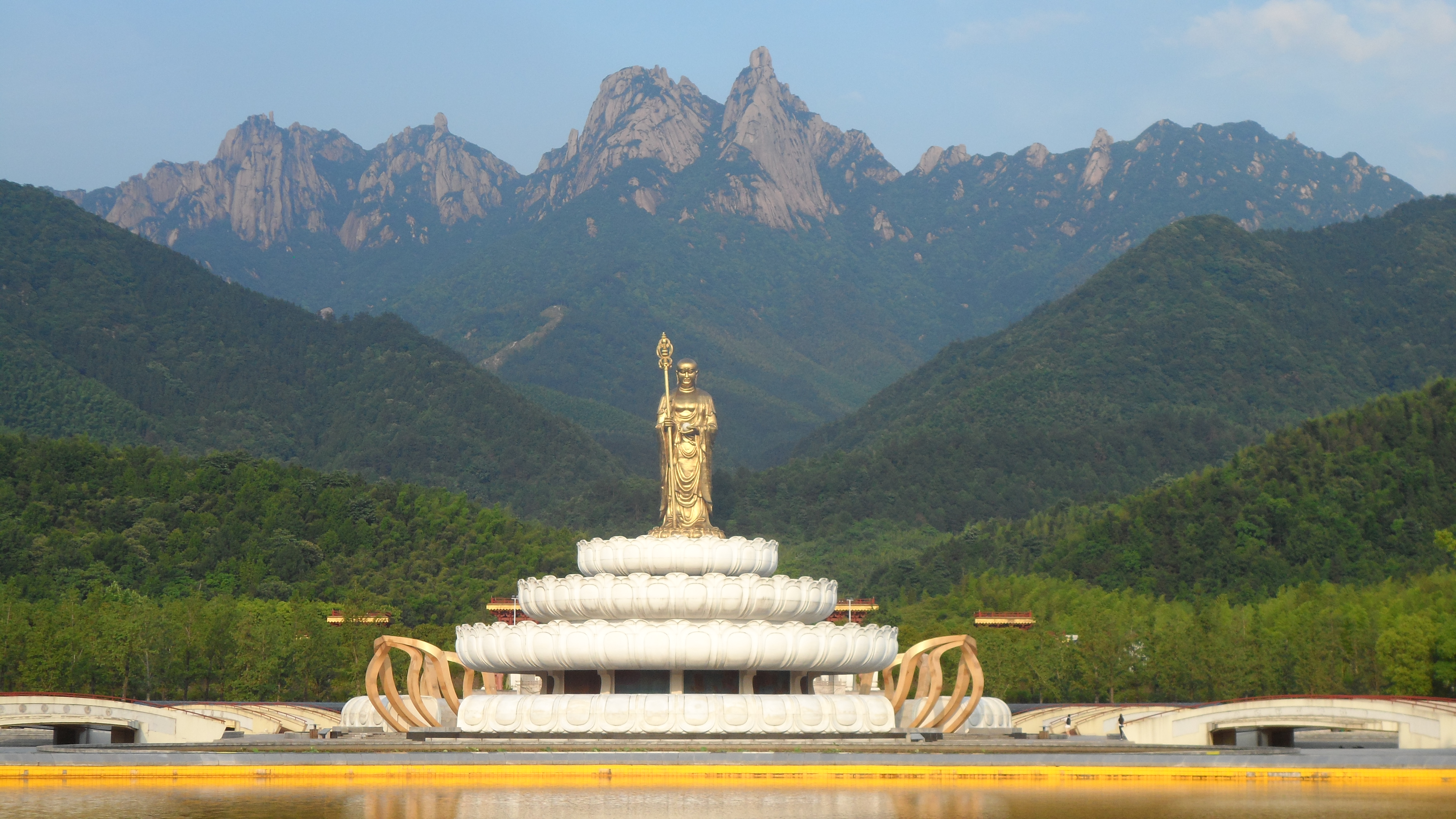 安徽九华山大愿文化园